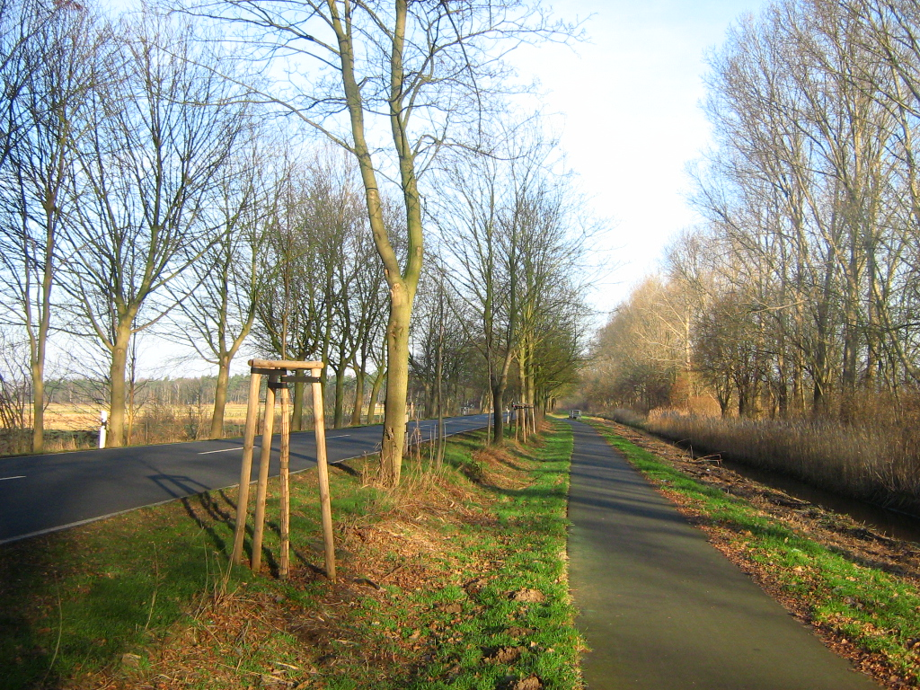 Der Kremmer Damm, die alte Straße durch das Kremmener Luch